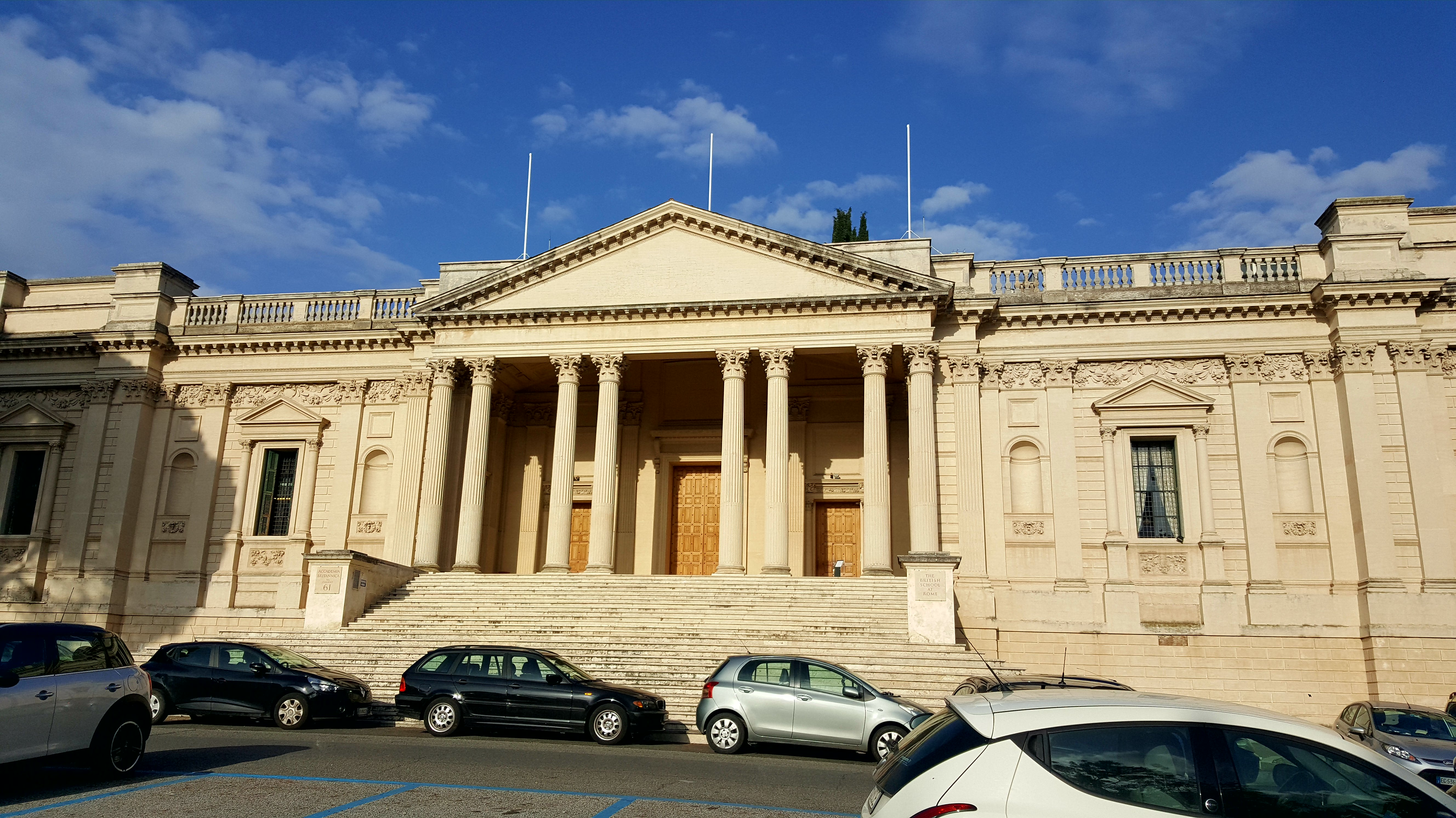 Sede British Academy a Roma